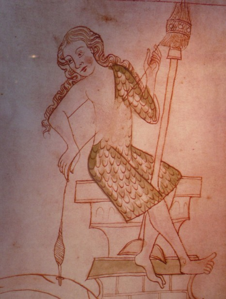 Velislai biblia picta